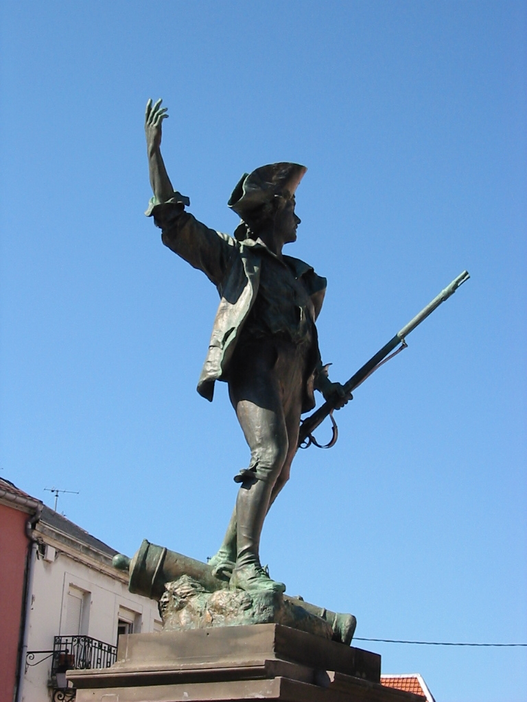 Le Volontaire de 1792, par Paul-François Choppin (1856-1937) à Remiremont, département des Vosges (France). Copyright © Christian Amet .